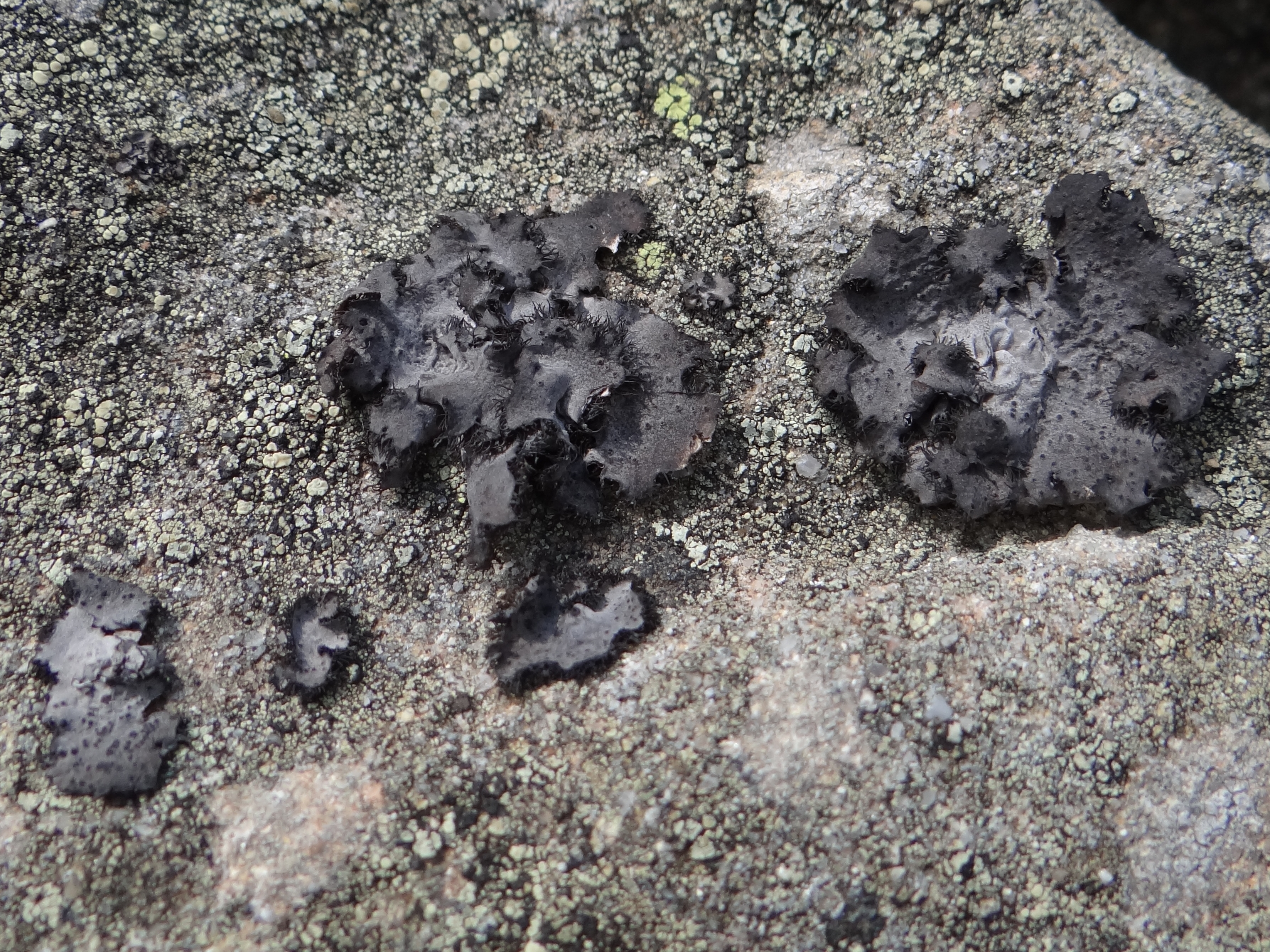 Umbilicaria cylindrica (location: Poland, Beskid Żywiecki, Babia Góra)